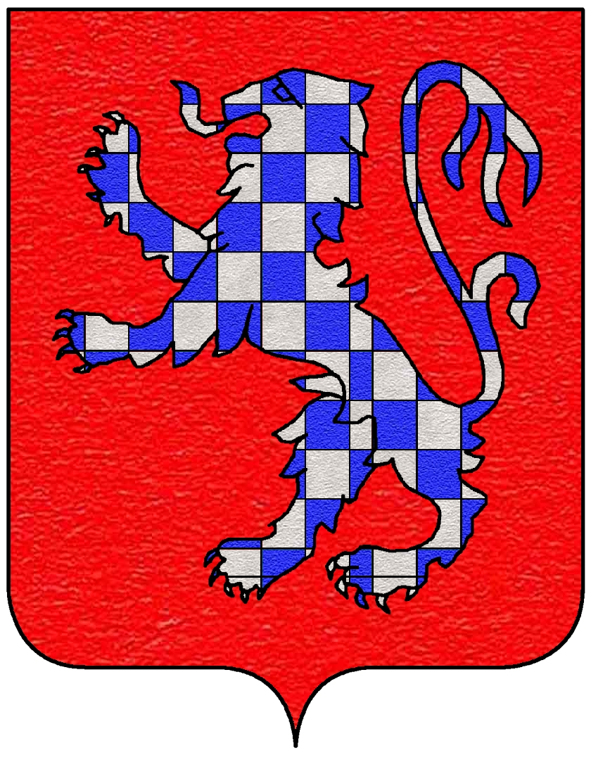 Stemma della famiglia Guiccioli